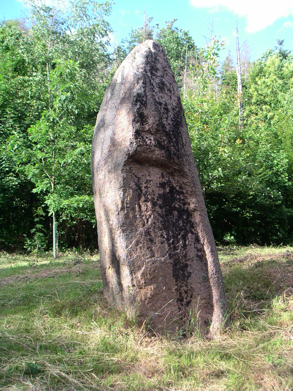 Menhir en granite sur la commune de Raon-l'Étape (Vosges)